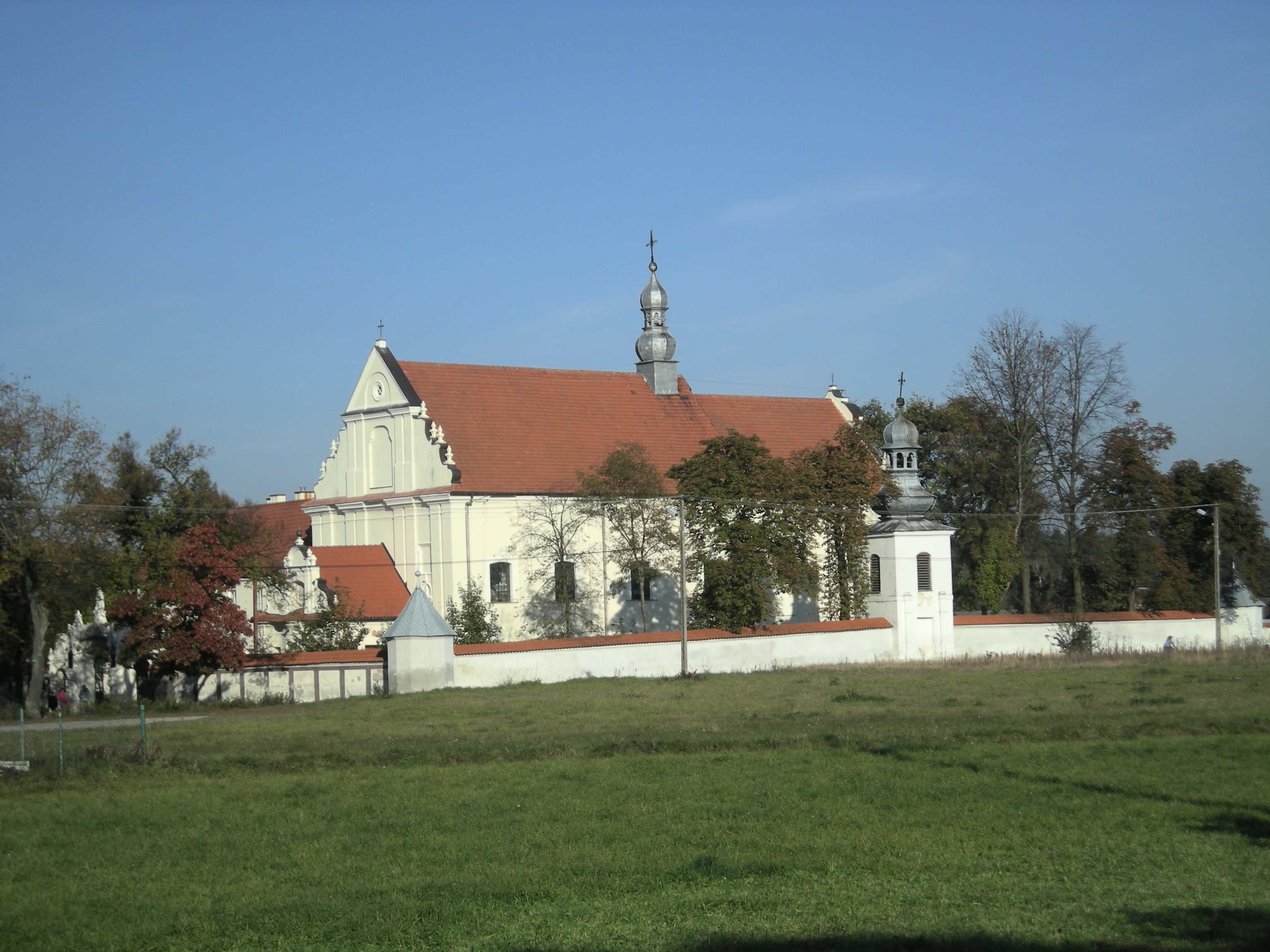 Kościół pw. św. Anny w Smardzewicach.